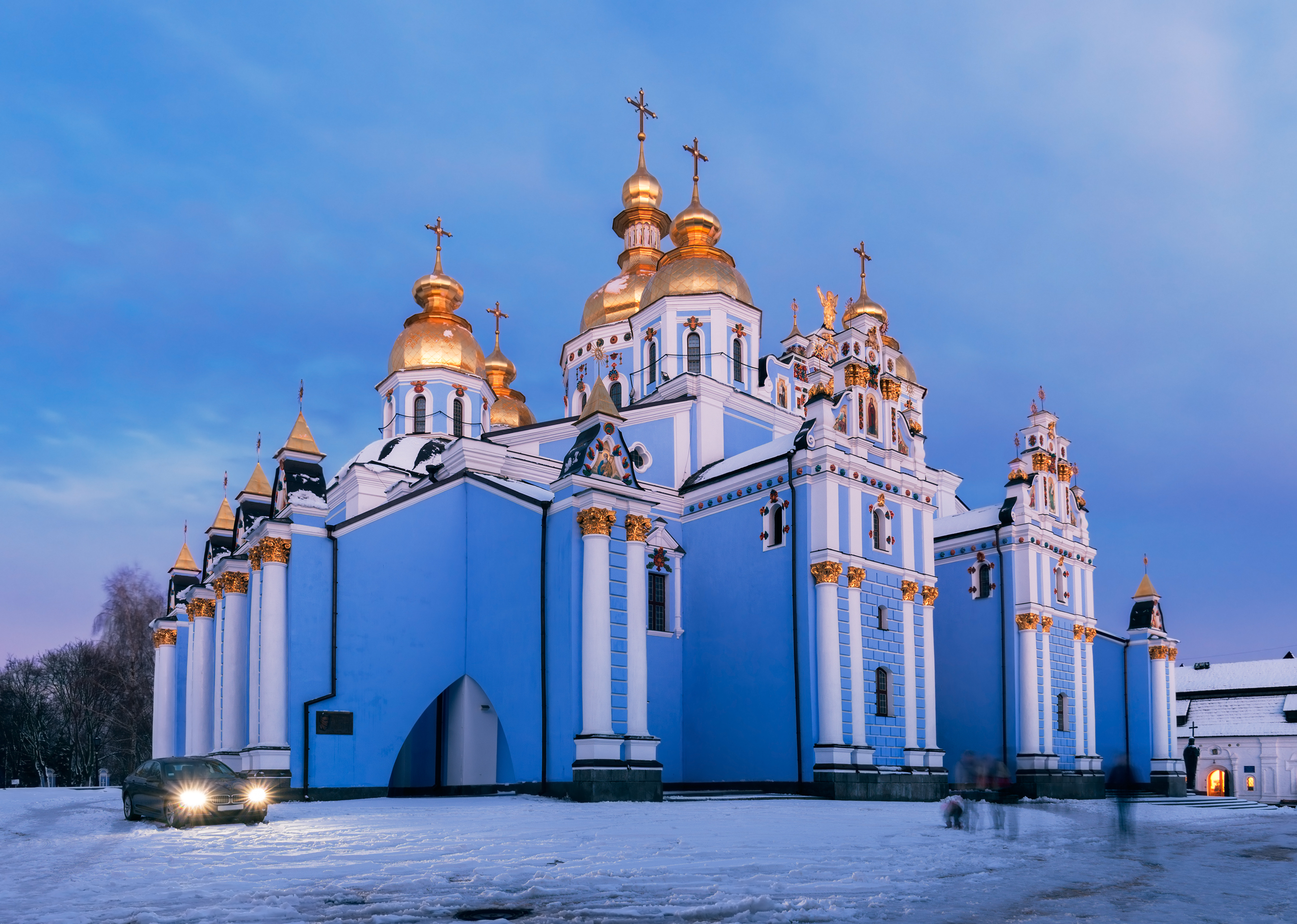 Комплекс споруд Михайлівського Золотоверхого монастиря, Київ, вул. Трьохсвятительська, 4–8